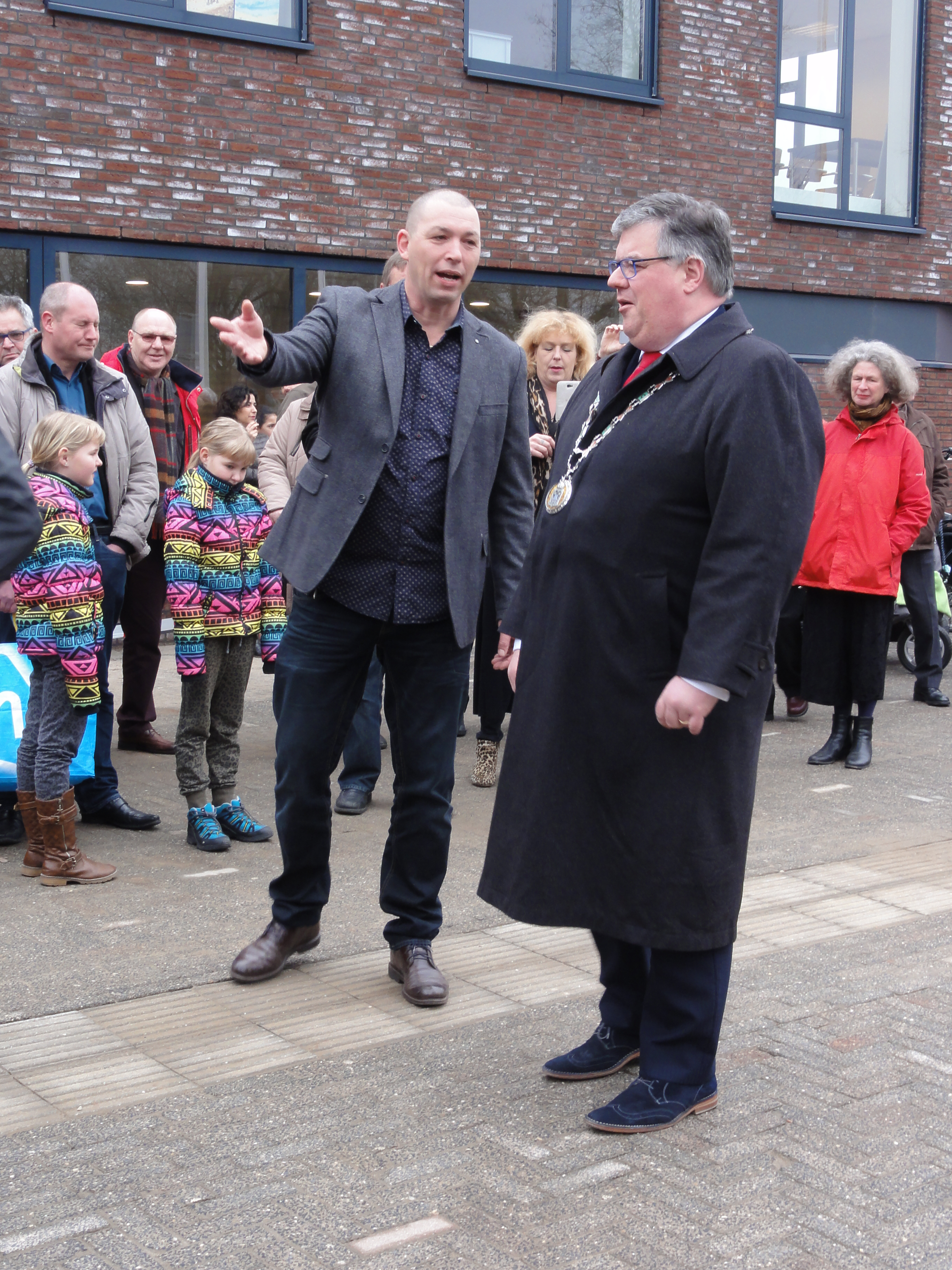 Nijmegen, opening wijkcentrum Dukenburg na renovatie